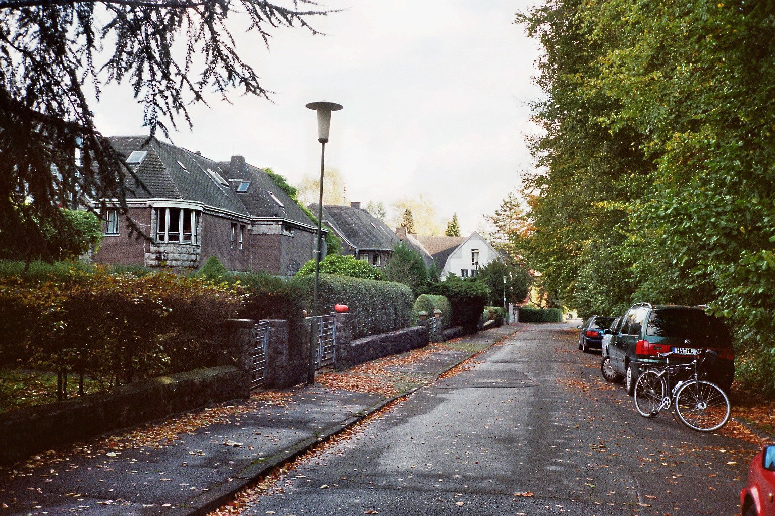 Die Gartenstadt Hohenhagen in Hagen, Westfalen